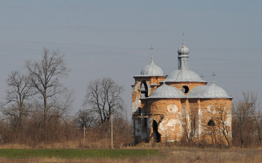 Петропавлiвська церква в селі Мойсівка (1808 р.). Збудована коштом Волховських